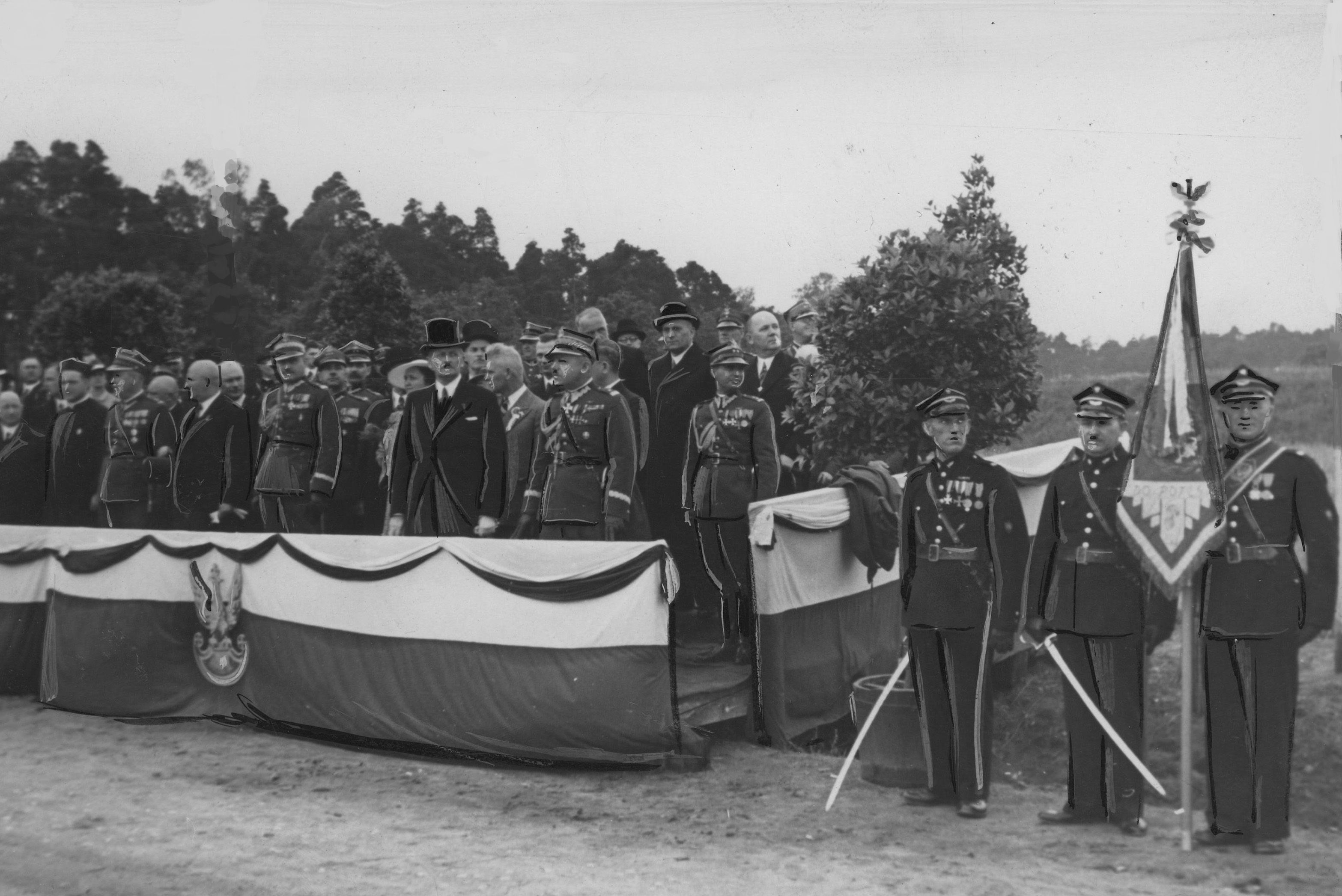 Święto 7 Dywizjonu Artylerii Przeciwlotniczej w Poznaniu - defilada w koszarach Dywizjonu; lipiec 1938. Na trybunie pierwszy z prawej gen. Edmund Knoll-Kownacki, za nim wojewoda poznański Artur Maruszewski. Z prawej widoczny także poczet sztandarowy. Koncern Ilustrowany Kurier Codzienny - Archiwum Ilustracji. Sygnatura: 1-W-1537-2